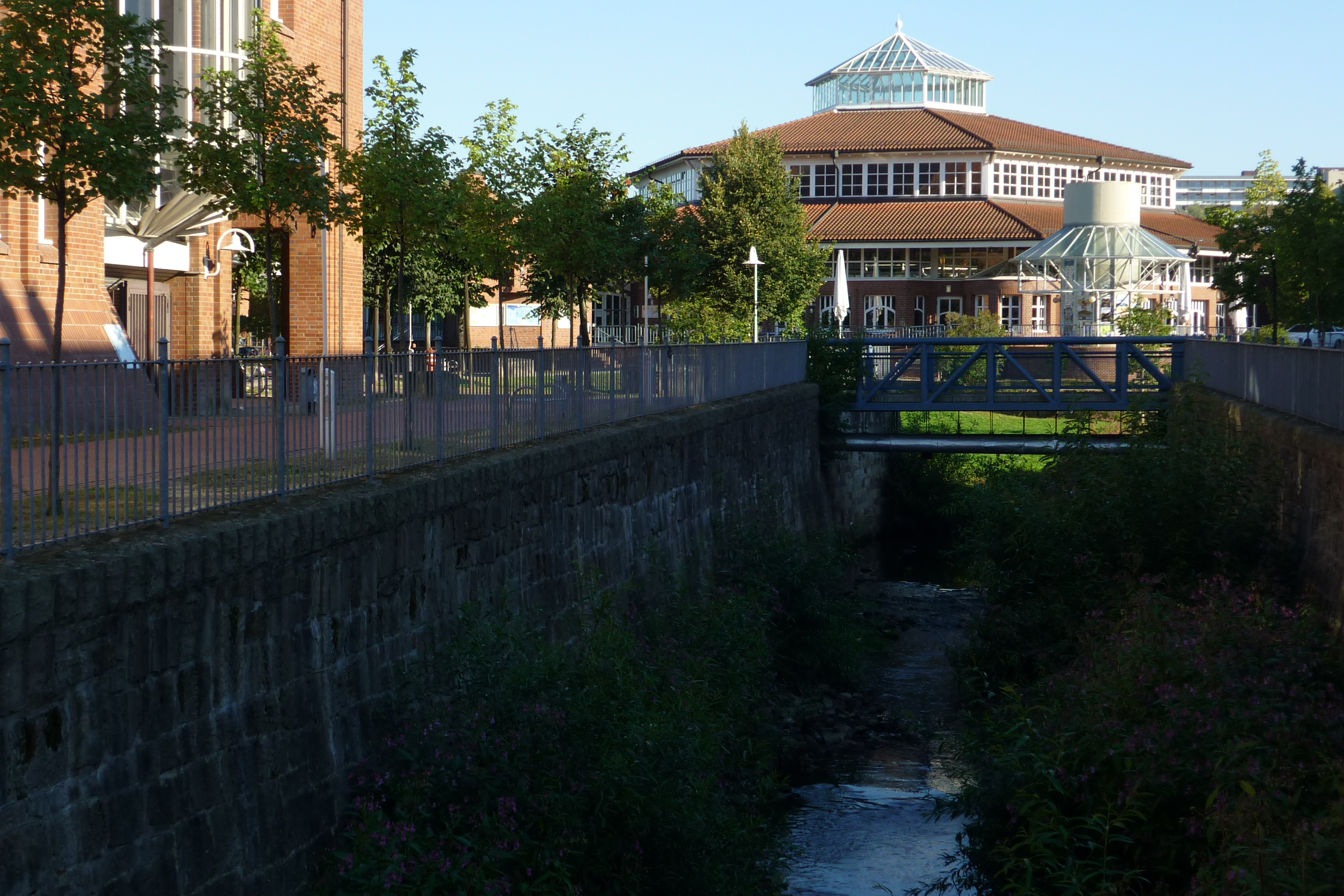 Universität Kassel - Der Blick auf die Ahne (im Hintergrund die Zentralmensa)